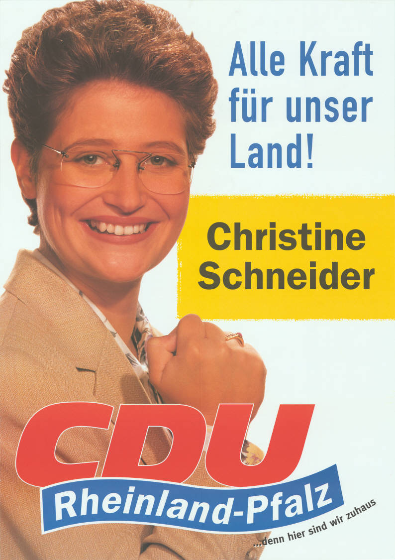 Alle Kraft für unser Land! Christine Schneider CDU Rheinland-Pfalz ... denn hier sind wir zuhaus Abbildung: Porträtfotoit geballter Faust Plakatart: Kandidaten-/Personenplakat mit Porträt Auftraggeber: CDU Rheinland-Pfalz Objekt-Signatur: 10-010:926 Bestand: Landtagswahlplakate Rheinland-Pfalz (10-010) GliederungBestand10-18: Landtagswahlplakate Rheinland-Pfalz (10-010) » CDU Lizenz: KAS/ACDP 10-010:926 CC-BY-SA 3.0 DE